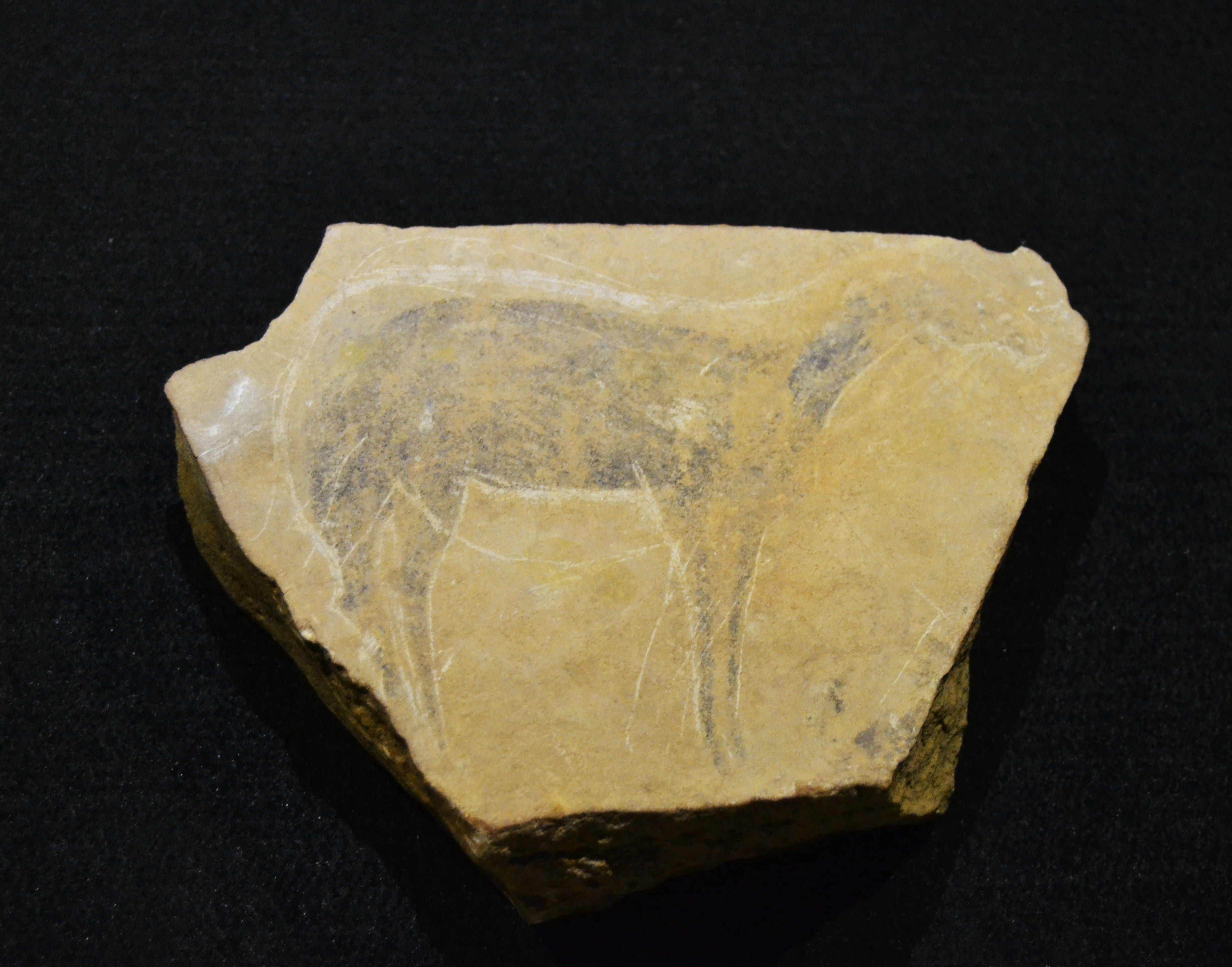 Plaqueta calcària decorada amb cérvola pintada i èquids gravats de la Cova del Parpalló (Gandia). Solutrià inferior: entre 21000 i 19000 anys aC. Museu de Prehistòria de València.